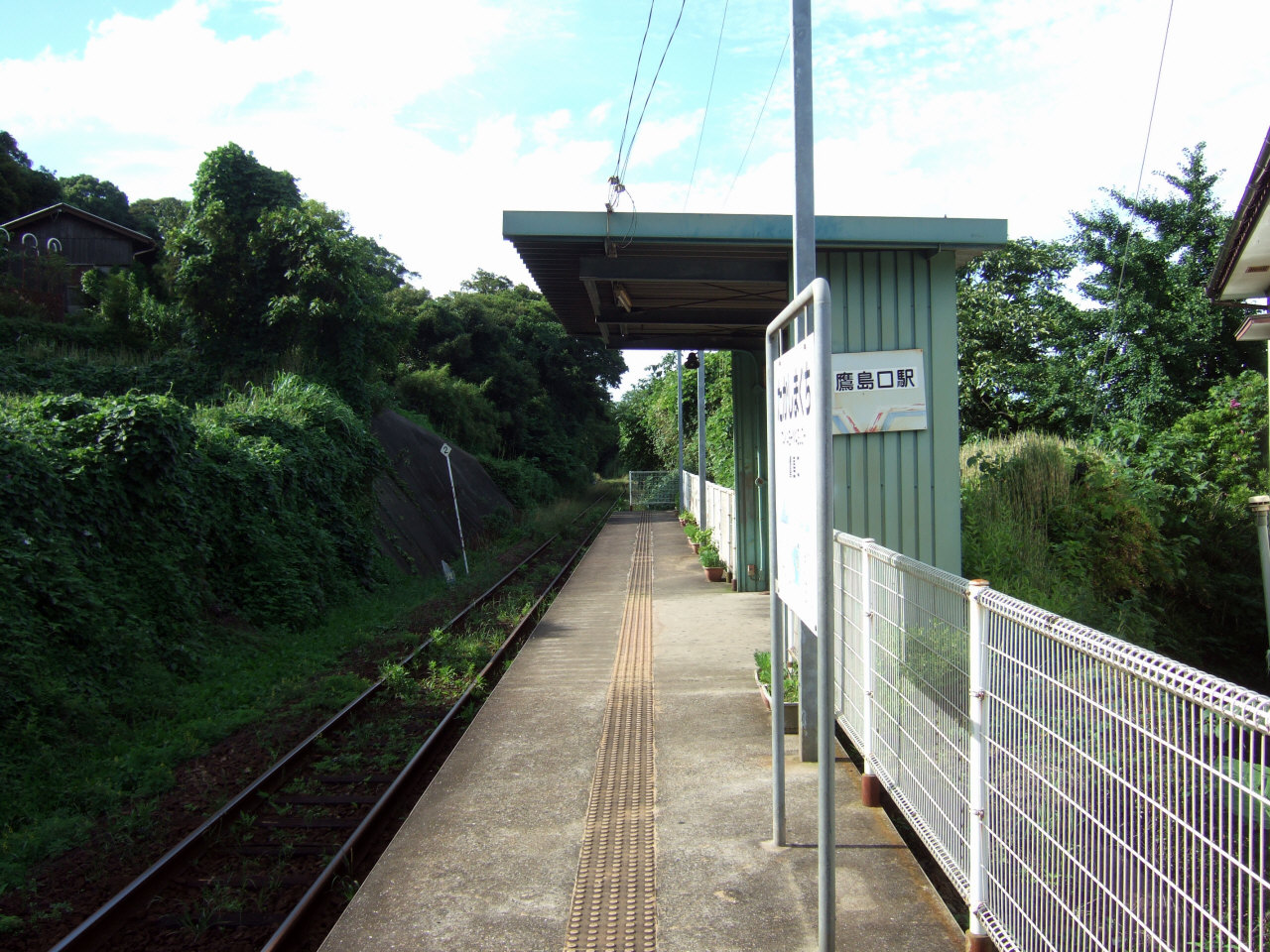 松浦鉄道鷹島口駅（Matsuura Railway Takashimaguchi Station）